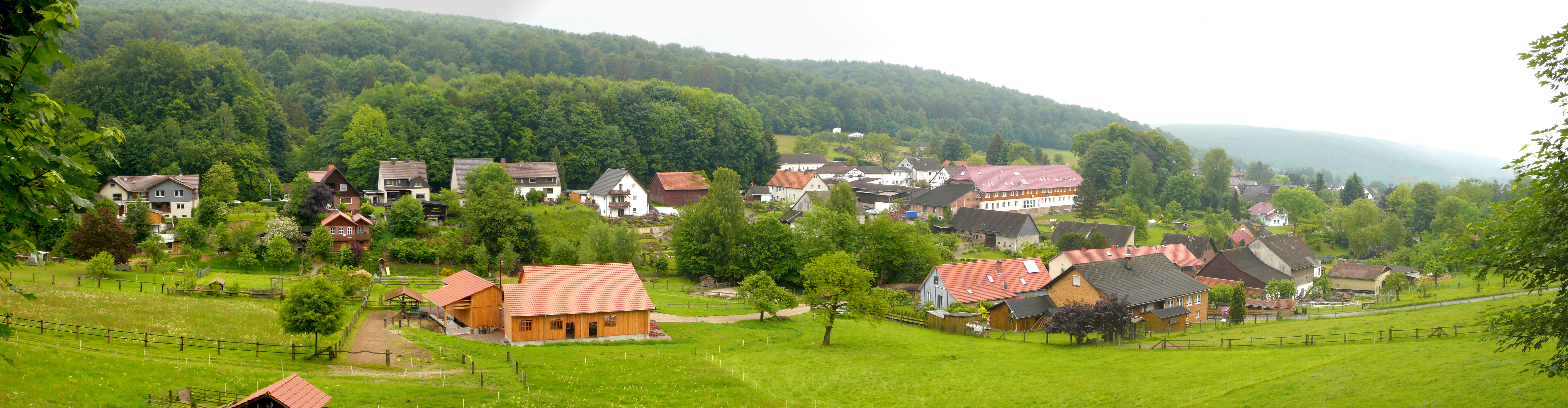 Blick von Nordwesten auf den nördlichen Teil von Amelith, Flecken Bodenfelde, Landkreis Northeim, Südniedersachsen.